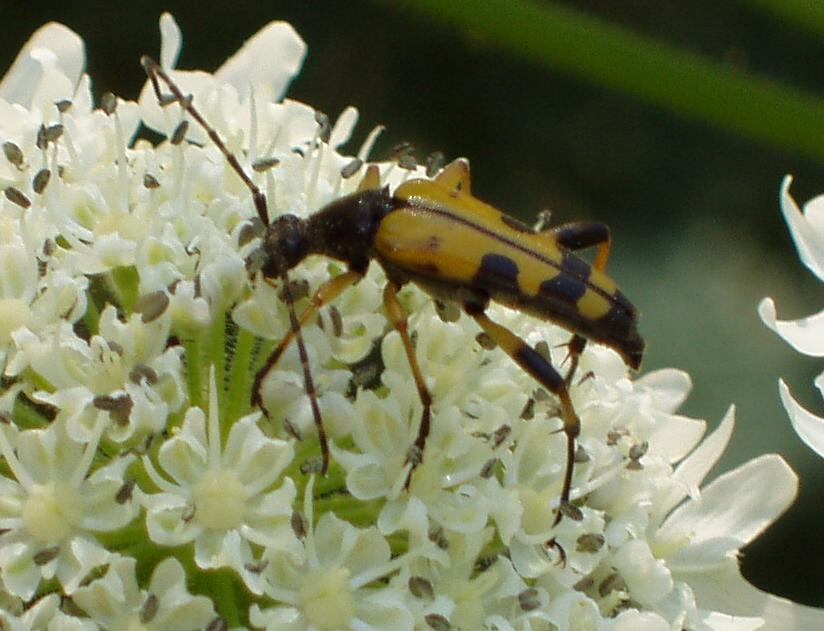 Coleoptera - Cerambycidae - Strangalia maculata (syn. Leptura maculata, Rutpela maculata)